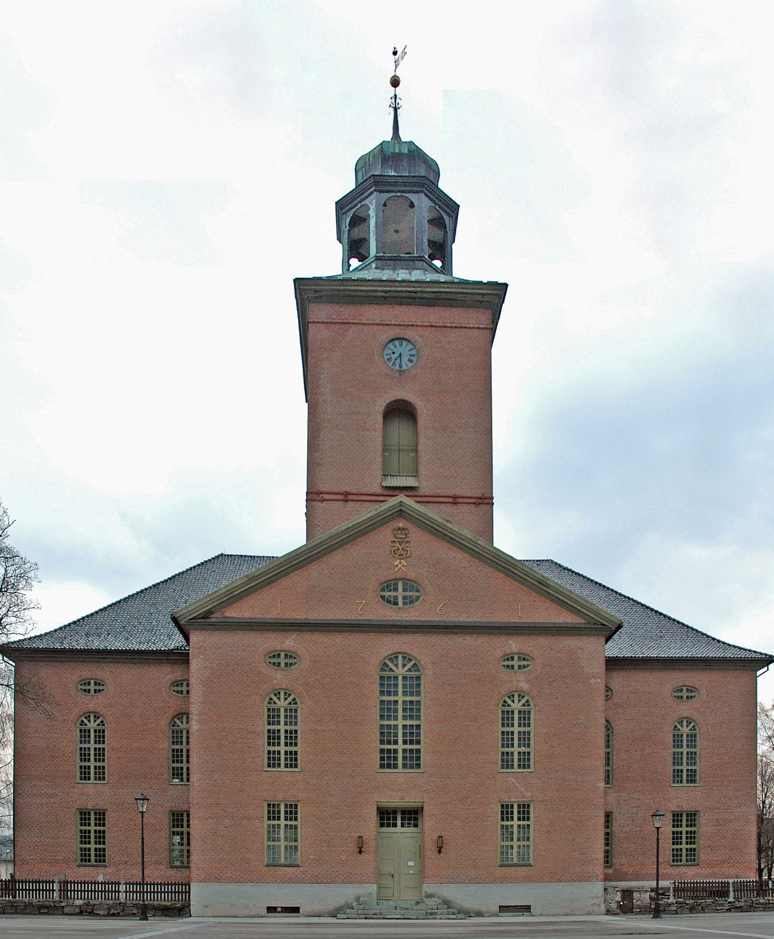 Kongsberg Kirke, Kongsberg